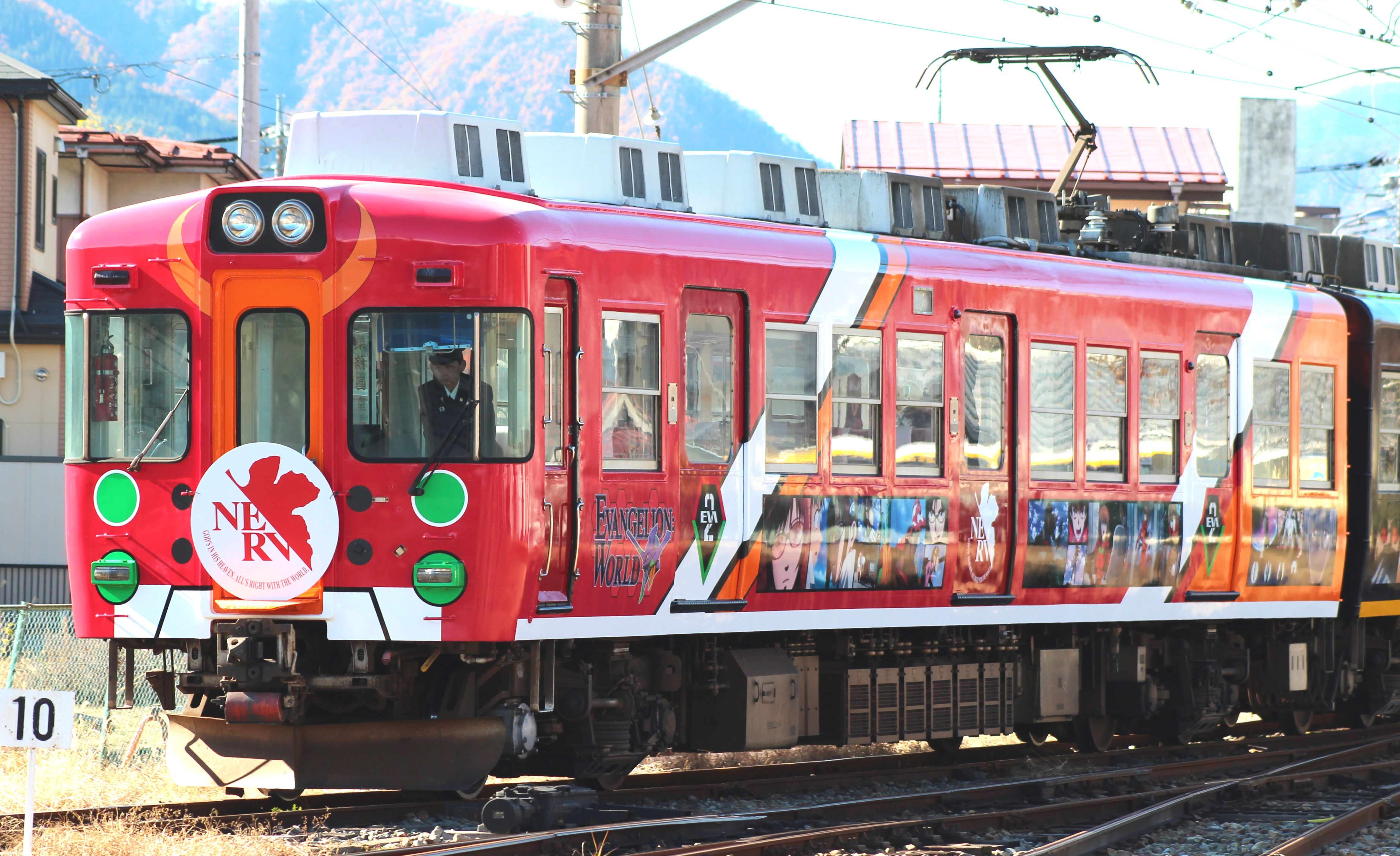 富士急行1200形電車 「ヱヴァンゲリヲン新劇場版:Ｑ公開記念電車」